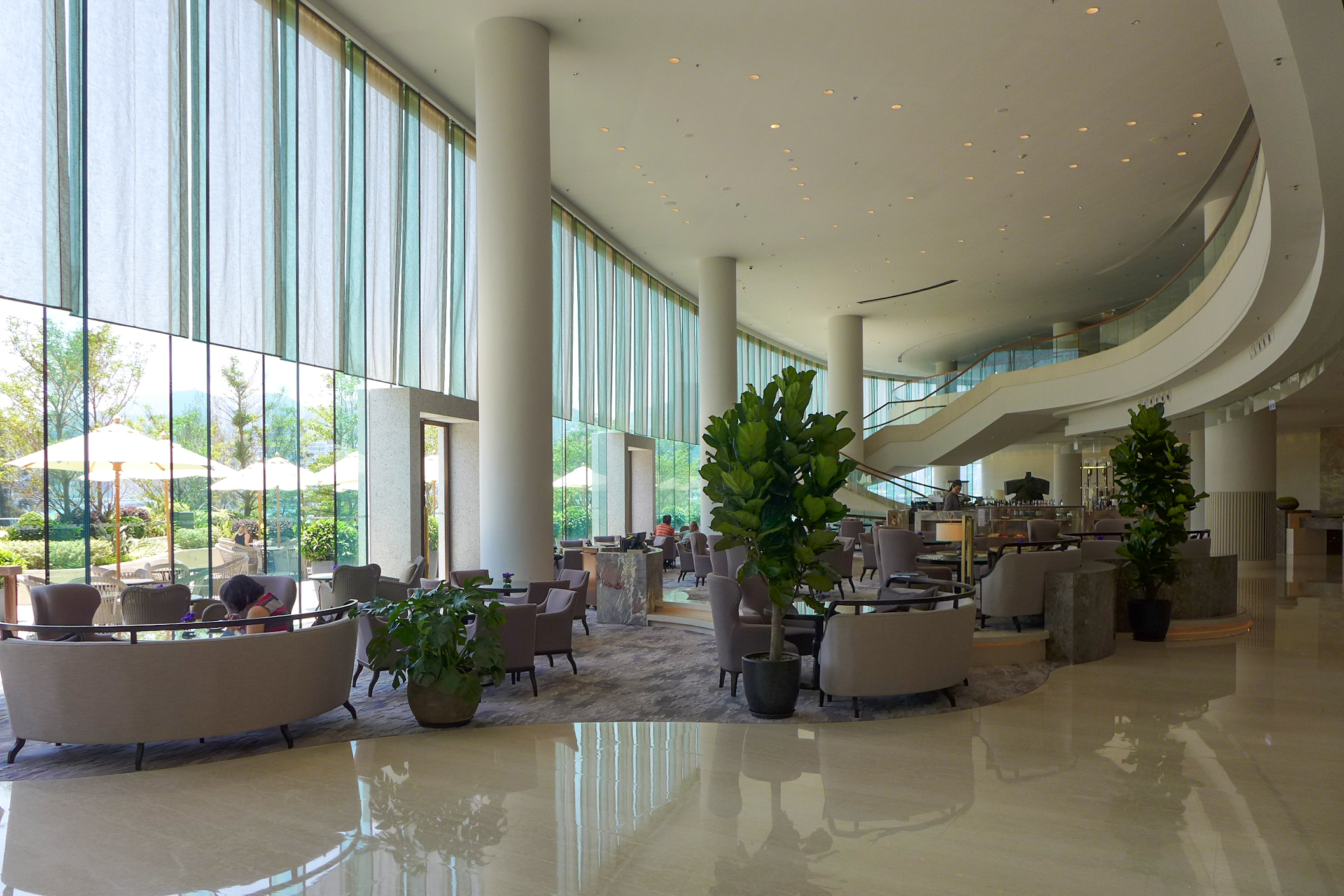 Kerry Hotel Hong Kong Lobby